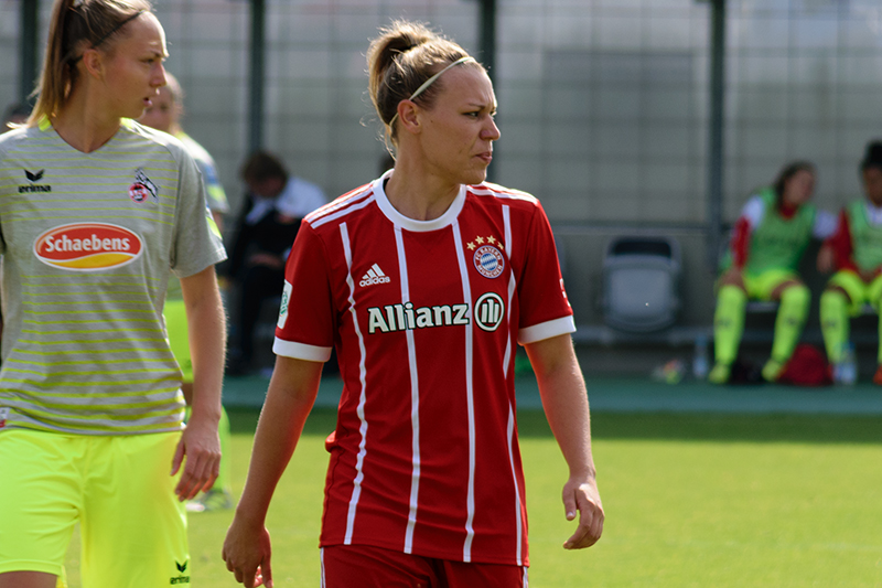 Kristin Demann